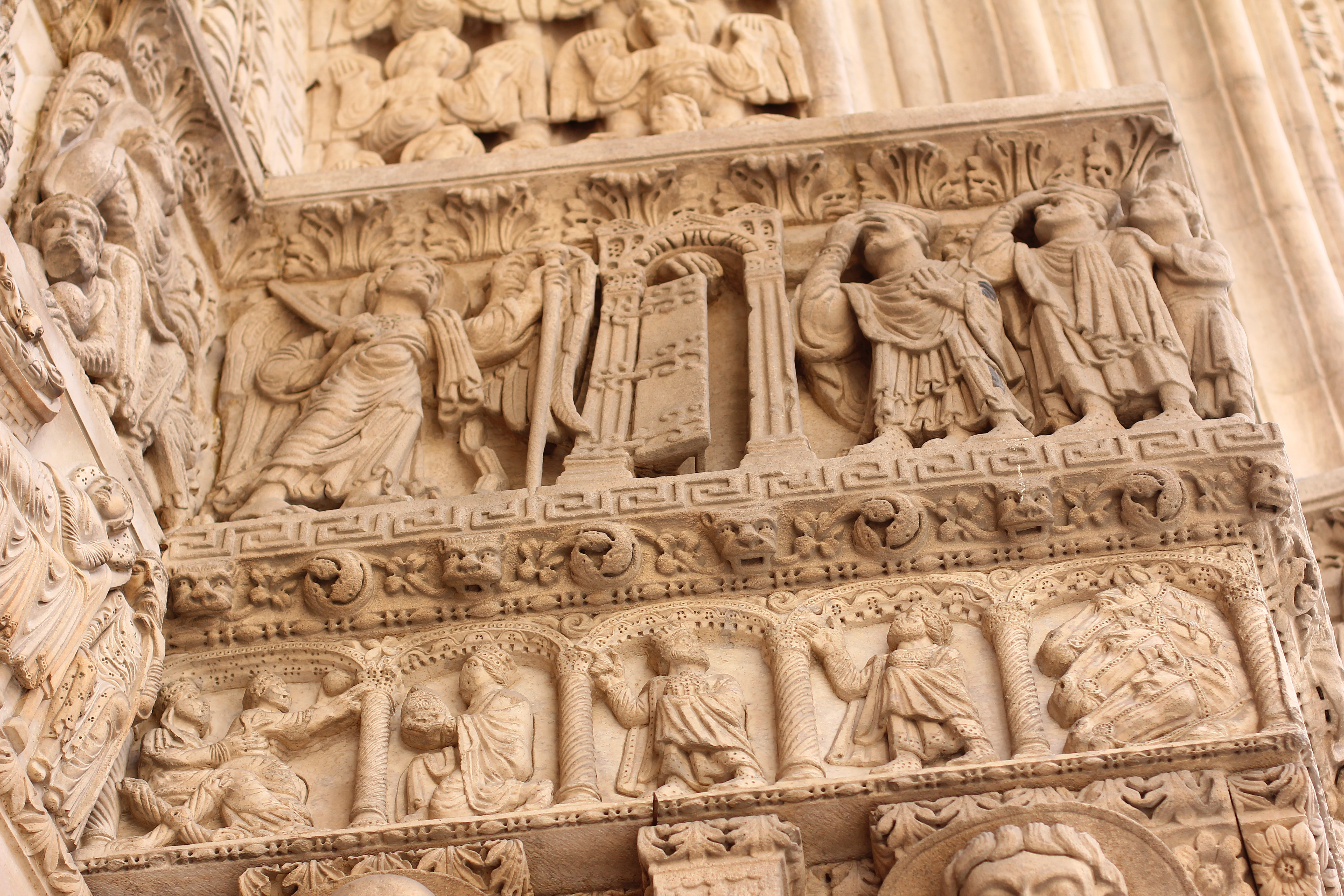 Страшный суд, грешники